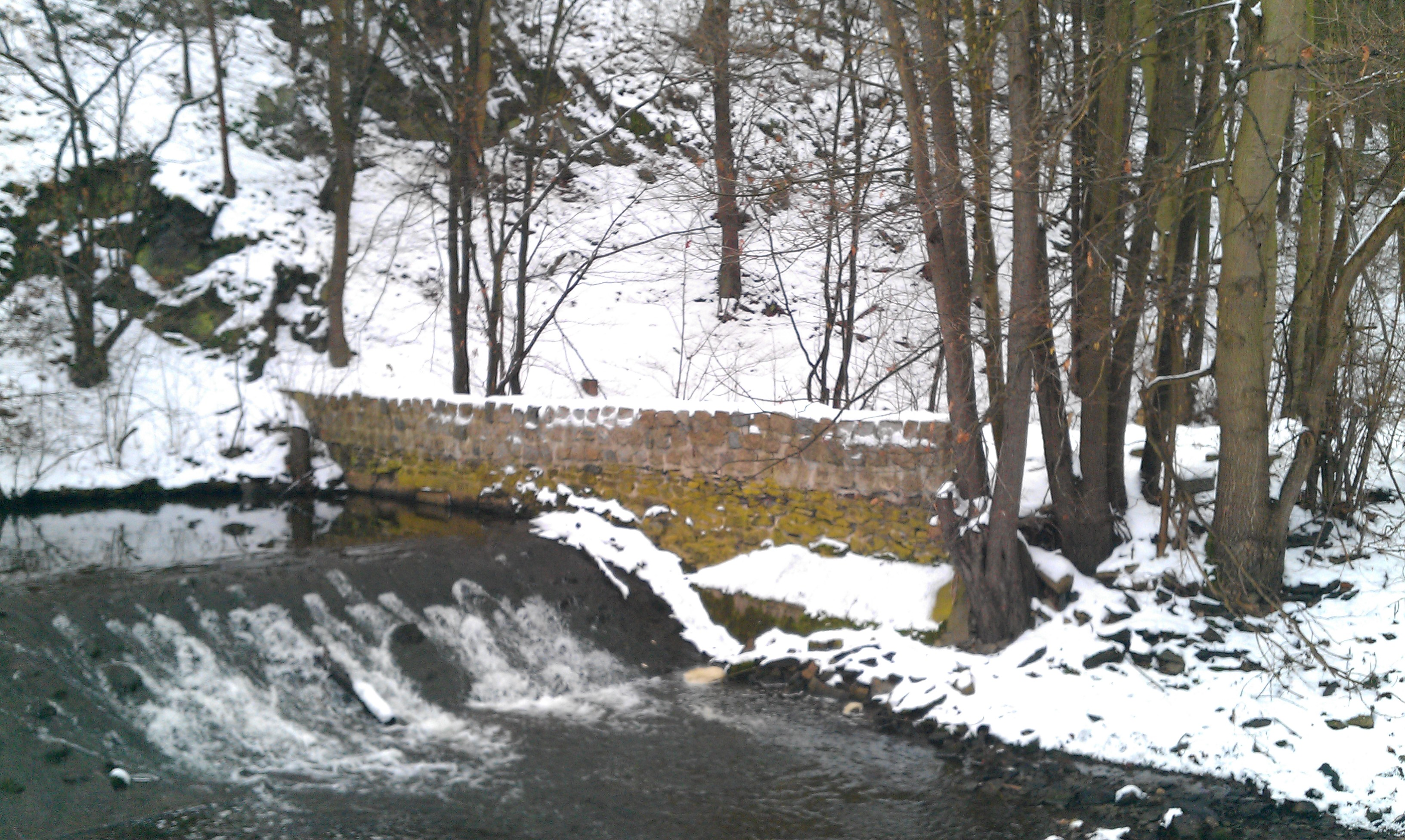 Irrigator Einlauf